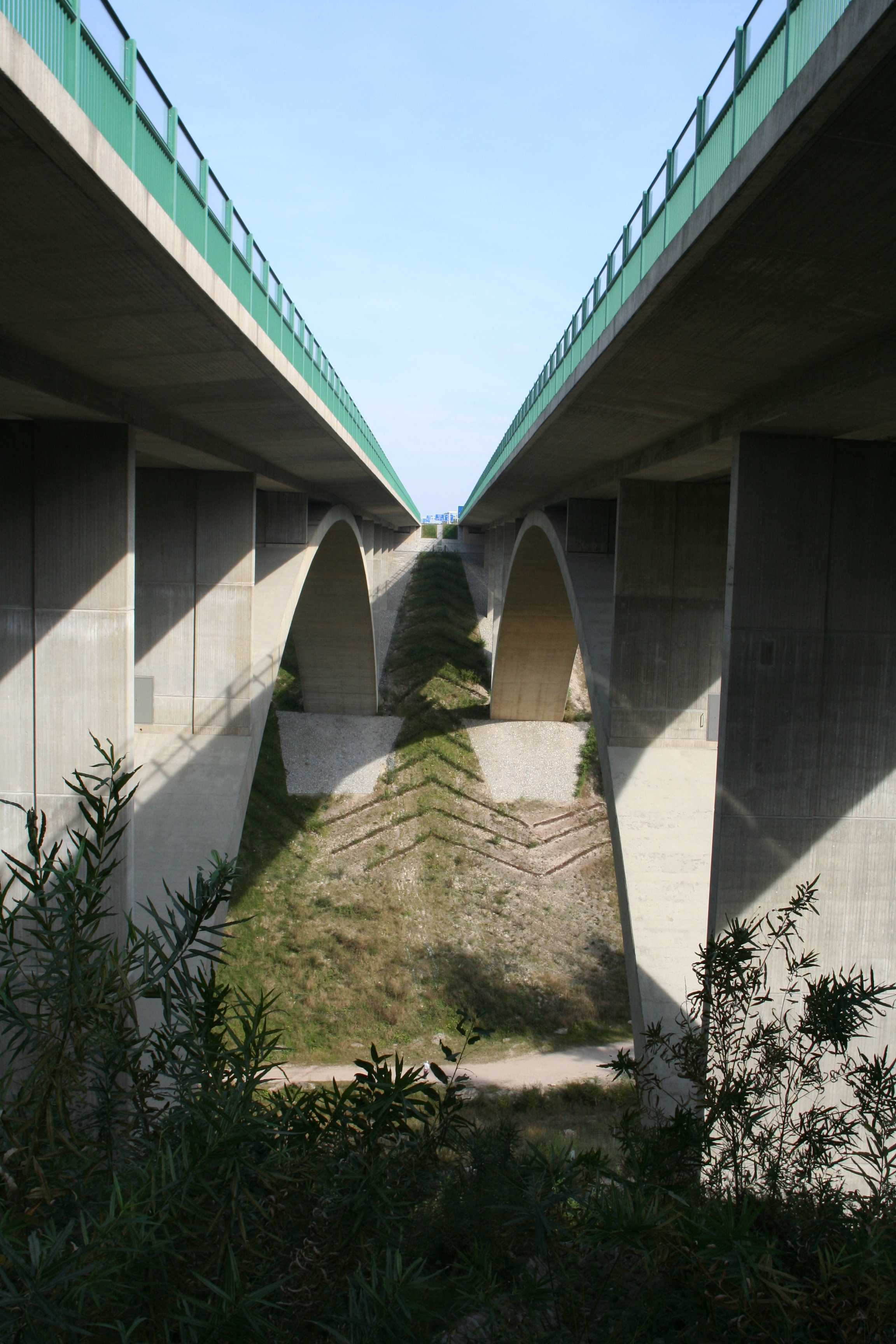 Teufelstalbrücke Bundesautobahn A4 bei Hermsdorf, Thüringen